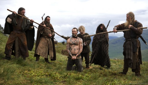 Combat International während der Dreharbeiten zum Film Walhalla Rising 2009 mit Mads Mikkelsen